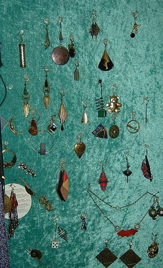 selbst fotografiert am 1.10.04, PD und GNUFDL, Bild: verschiedene Ohrringe; different earrings